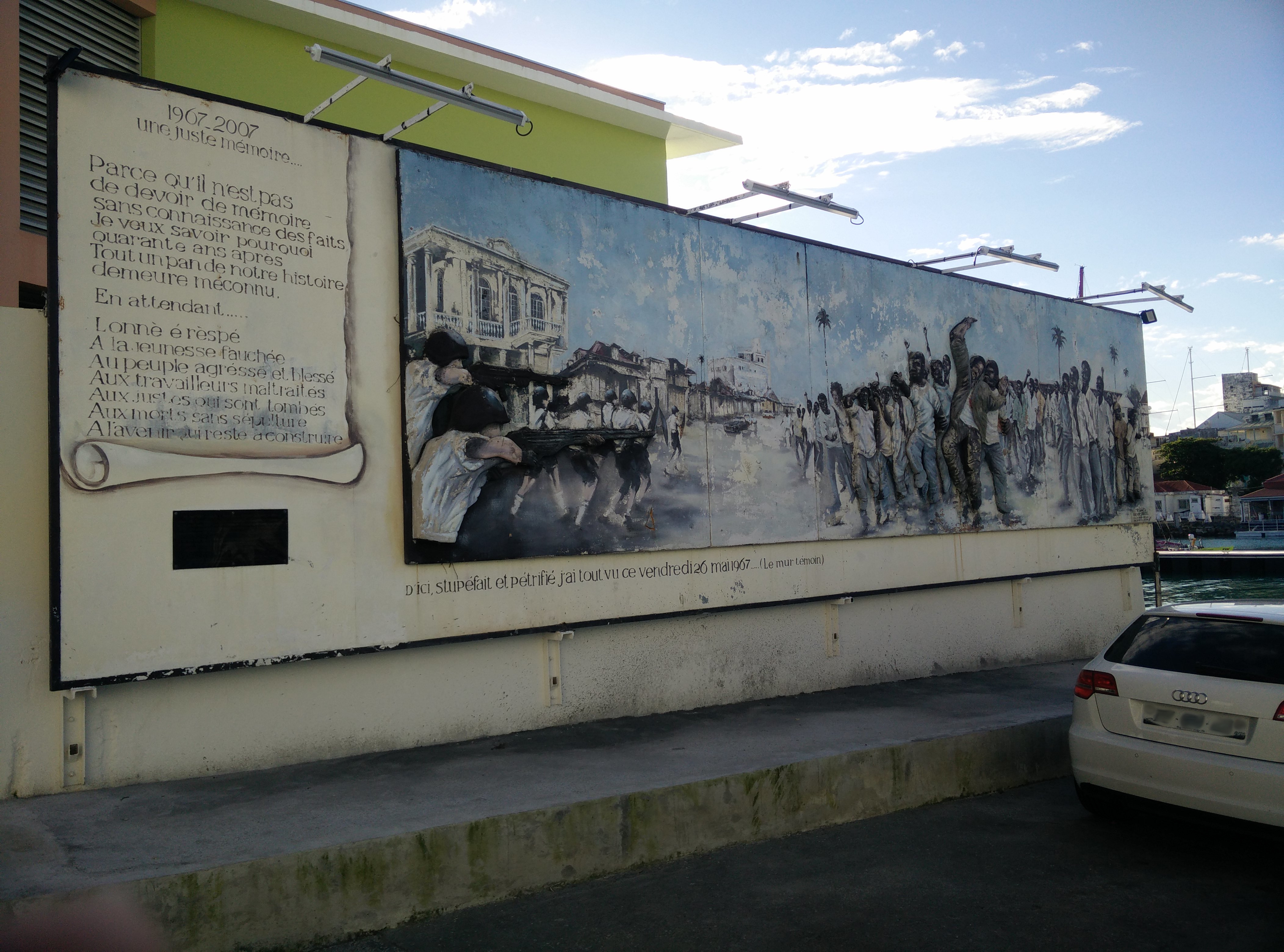 La fresque murale en hommage aux victimes de mai 1967 est une fresque du XXIe siècle réalisée par le plasticien guadeloupéen Philippe Laurent. Inaugurée le 26 mai 2007, elle est installée devant le collège Nestor-de-Kermadec, rue Dubouchage à Pointe-à-Pitre en Guadeloupe. Elle commémore les victimes des massacres de mai 1967.